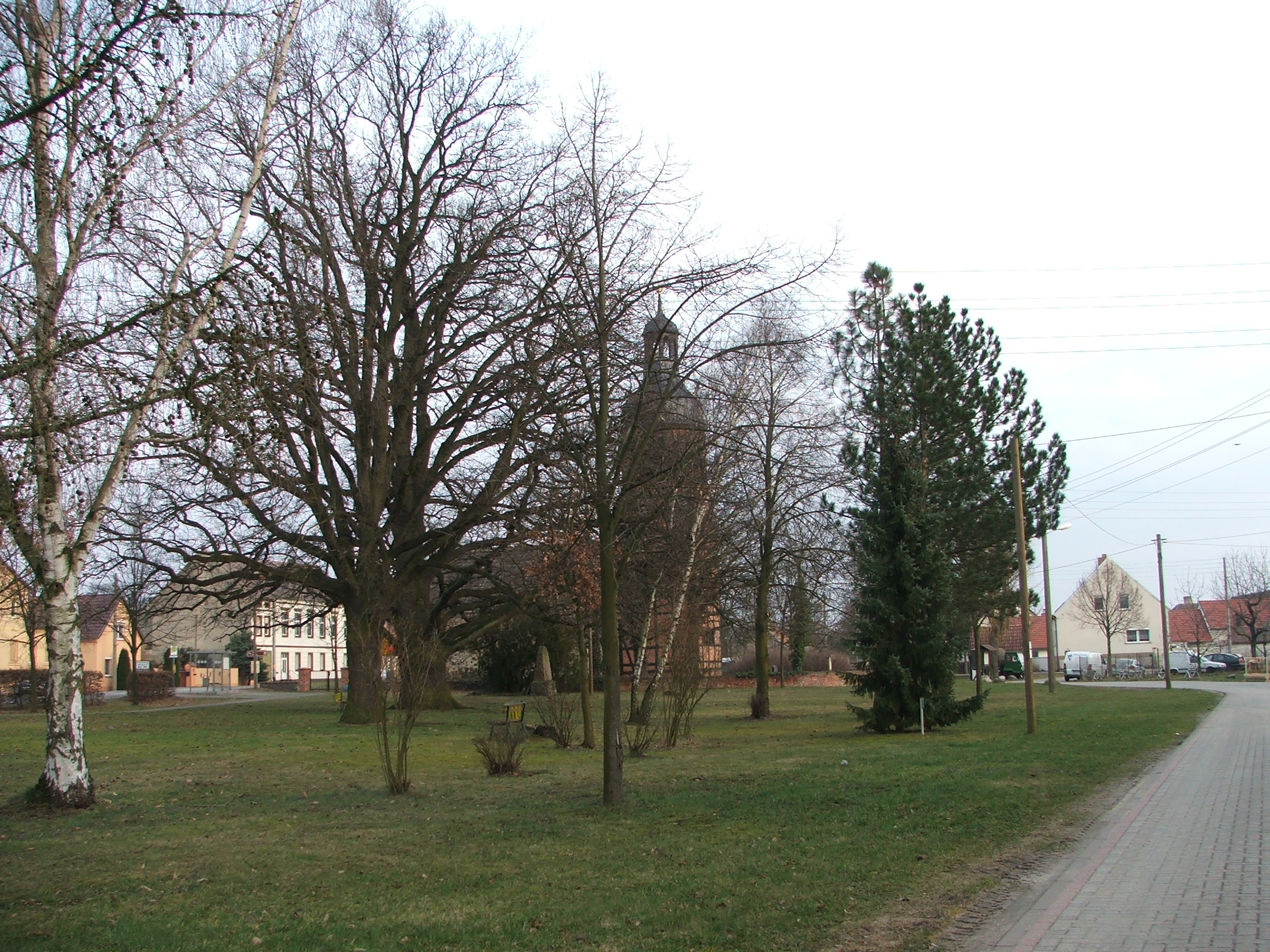 Langennaundorf, Dorfanger